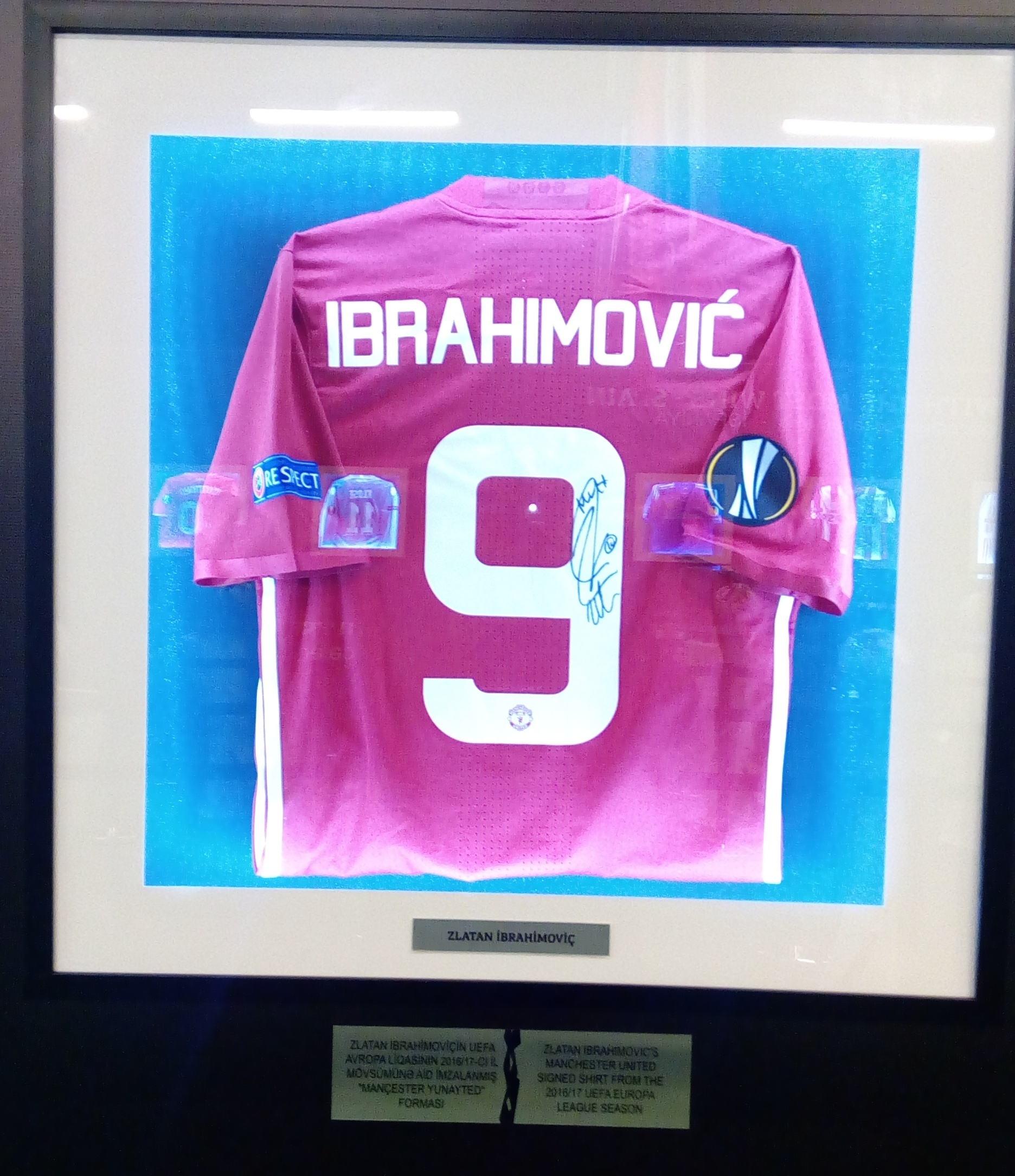 Avropa Liqası Muzeyi Bakıda